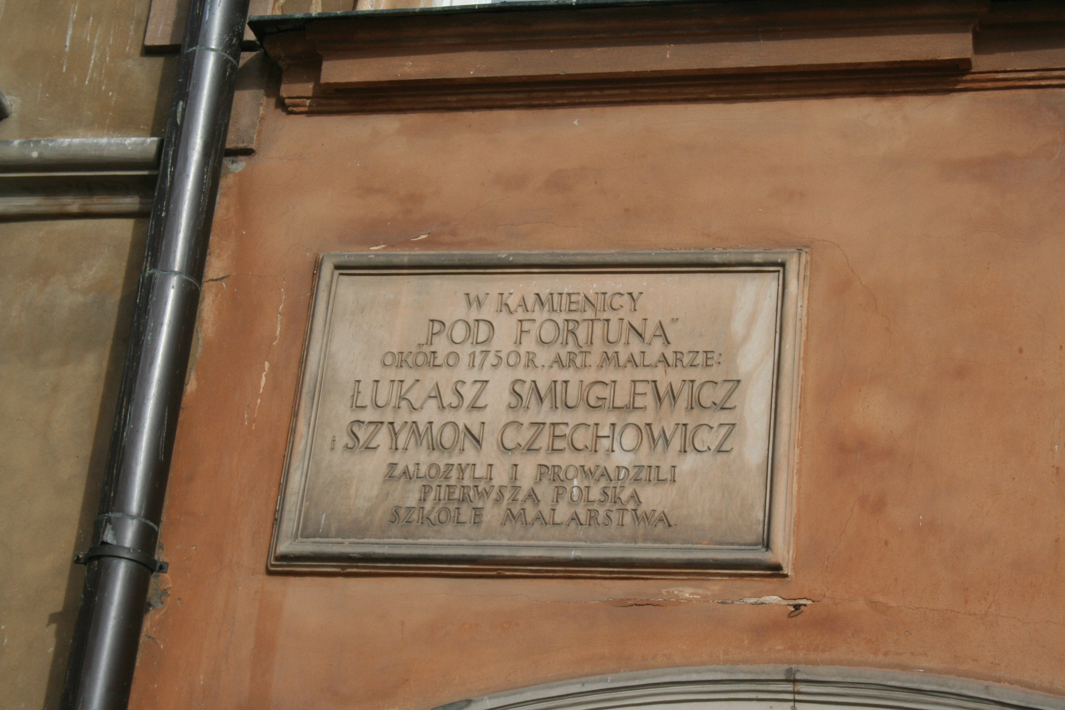 Tablica na frontowej elewacji kamienicy pod Fortuną